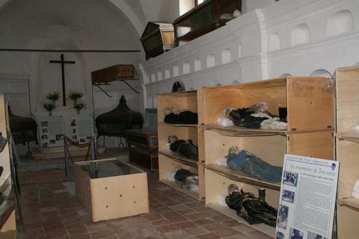 Cripta cappuccini Savoca